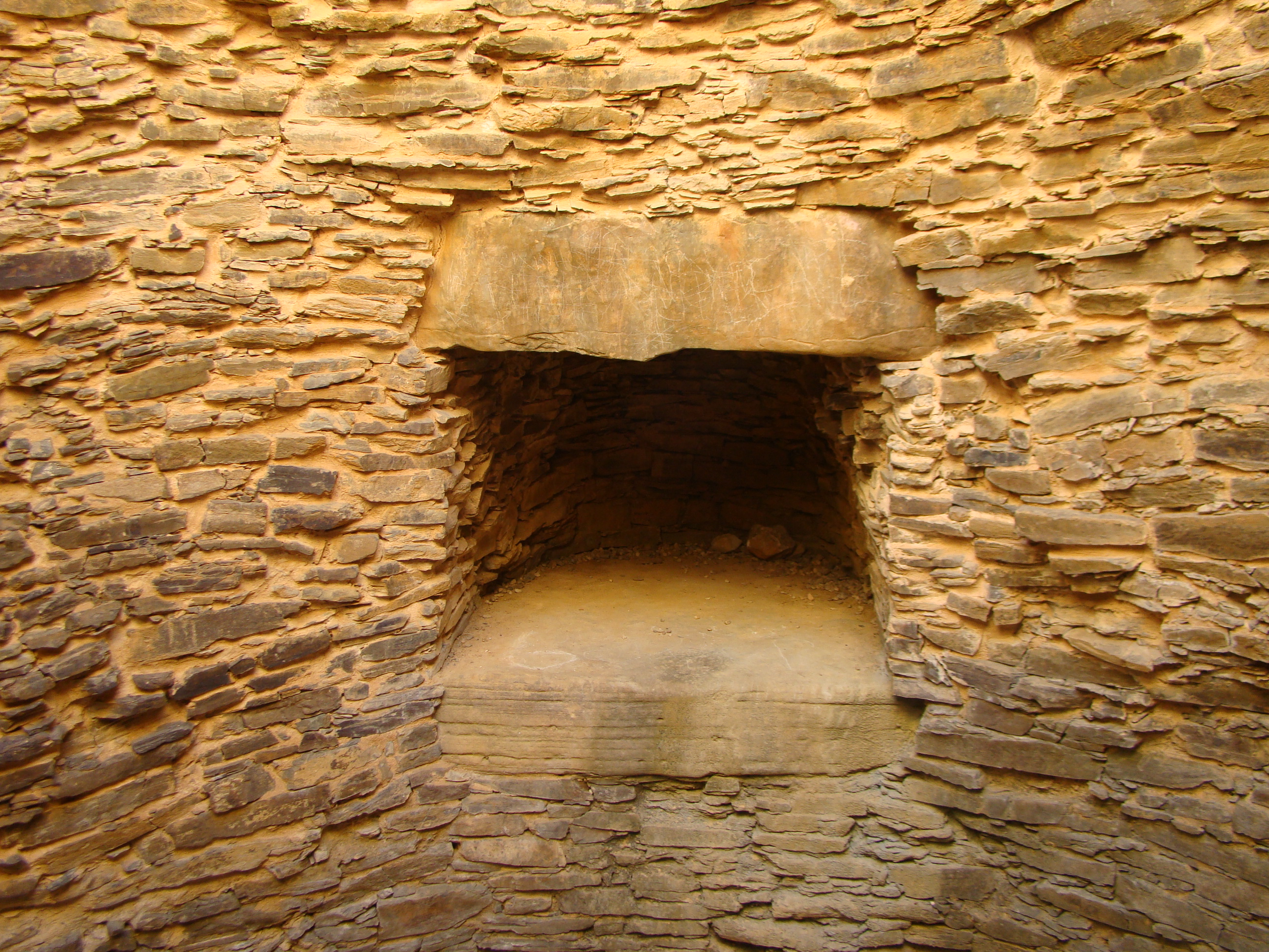 Centro de Alcalar 2017 - Monumento 7 - Nicho na cripta